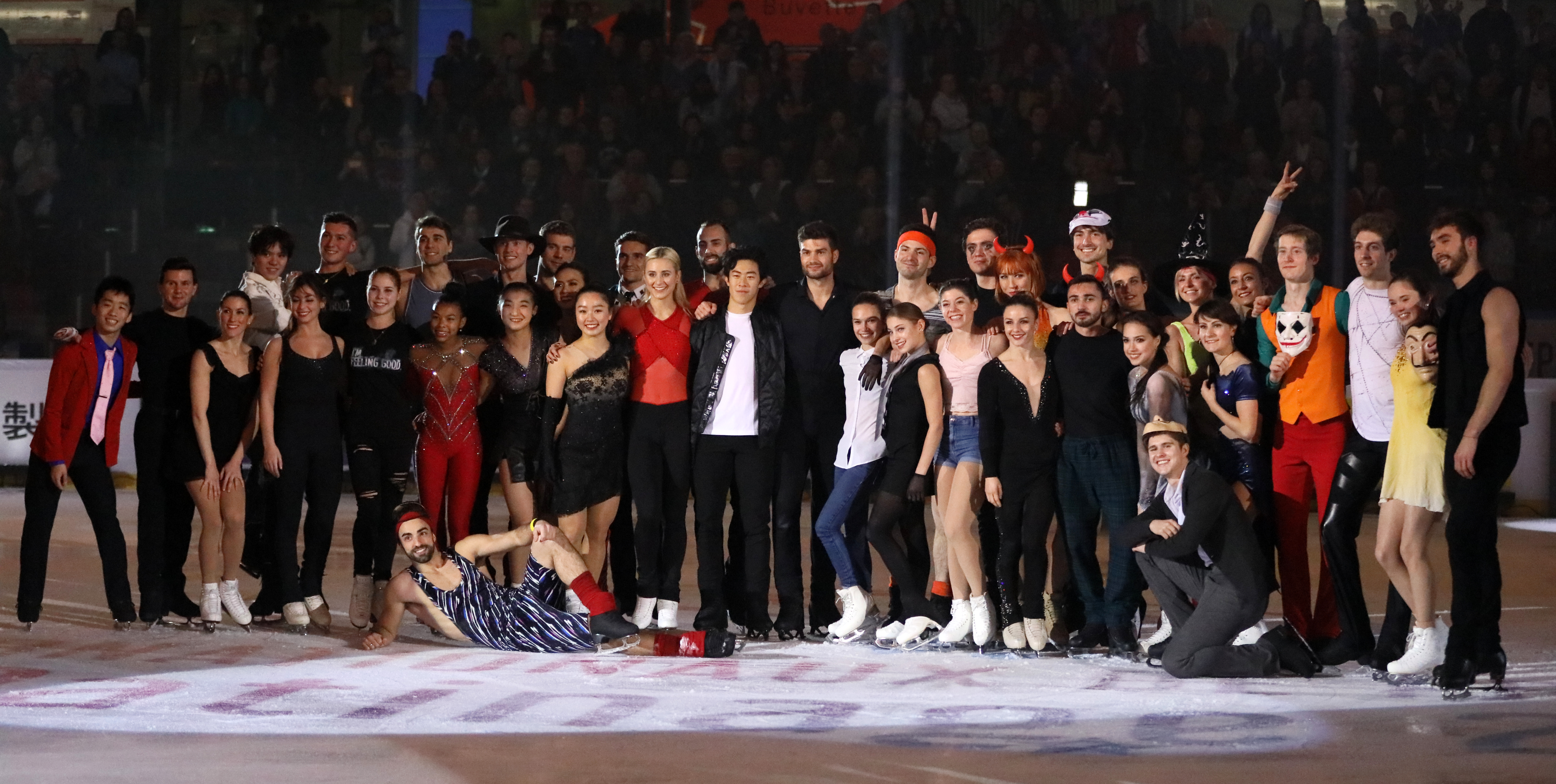 Gala des Internationaux de France 2019